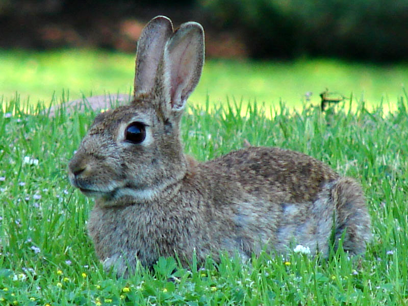 Conejo desconocido, averiguando a que tipo de familia Pertenece.